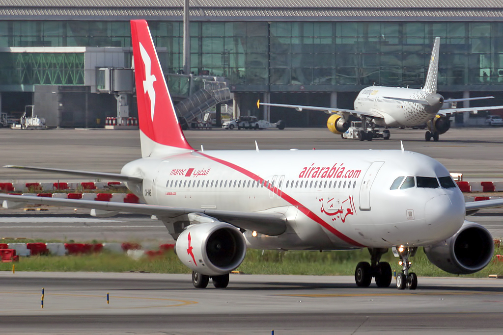 Barcelona El Prat (LEBL/BCN) Airport